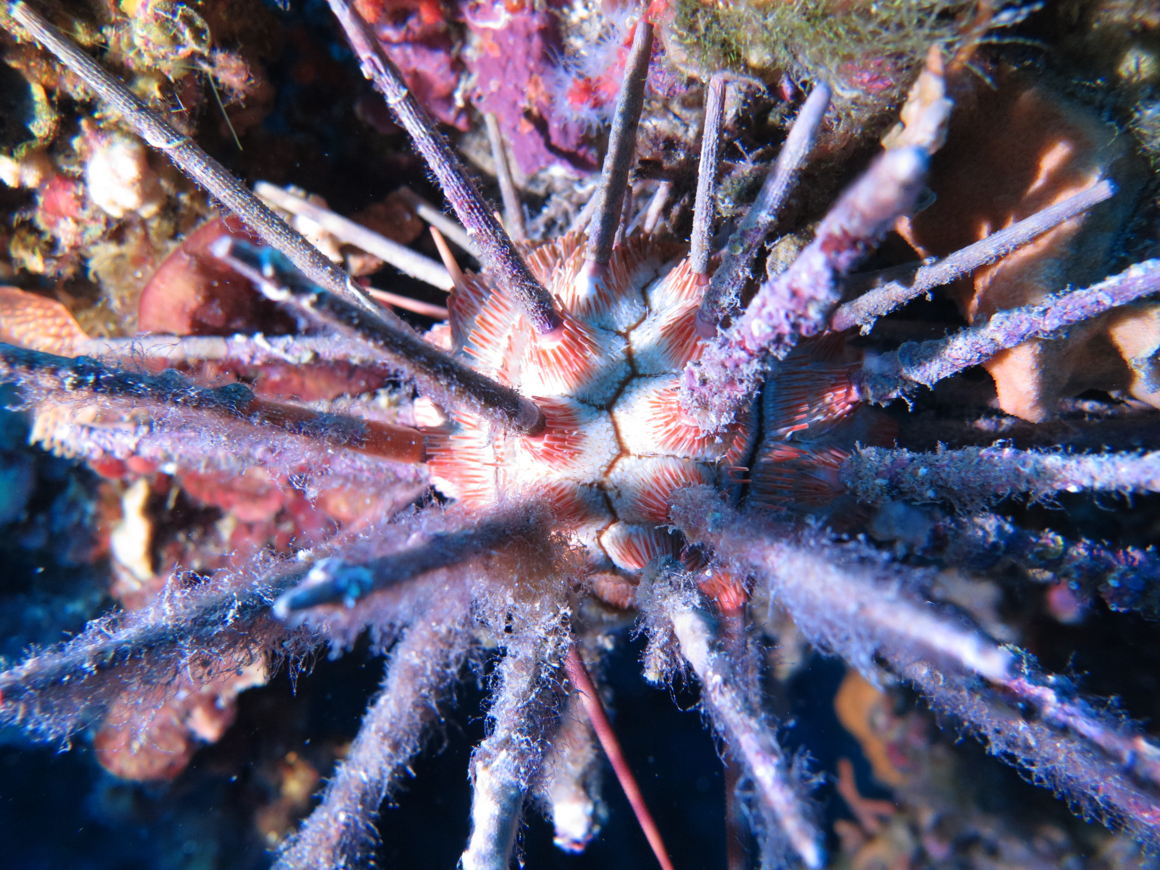 Oursin lance rouge - Cidaris cidaris. Presqu'île de Giens, Hyères, France. Îlot du Fourmigon. Août 2016.